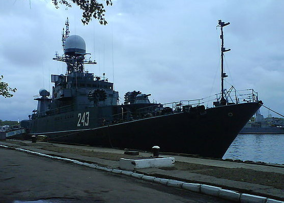 МПК-227 в Балтийске